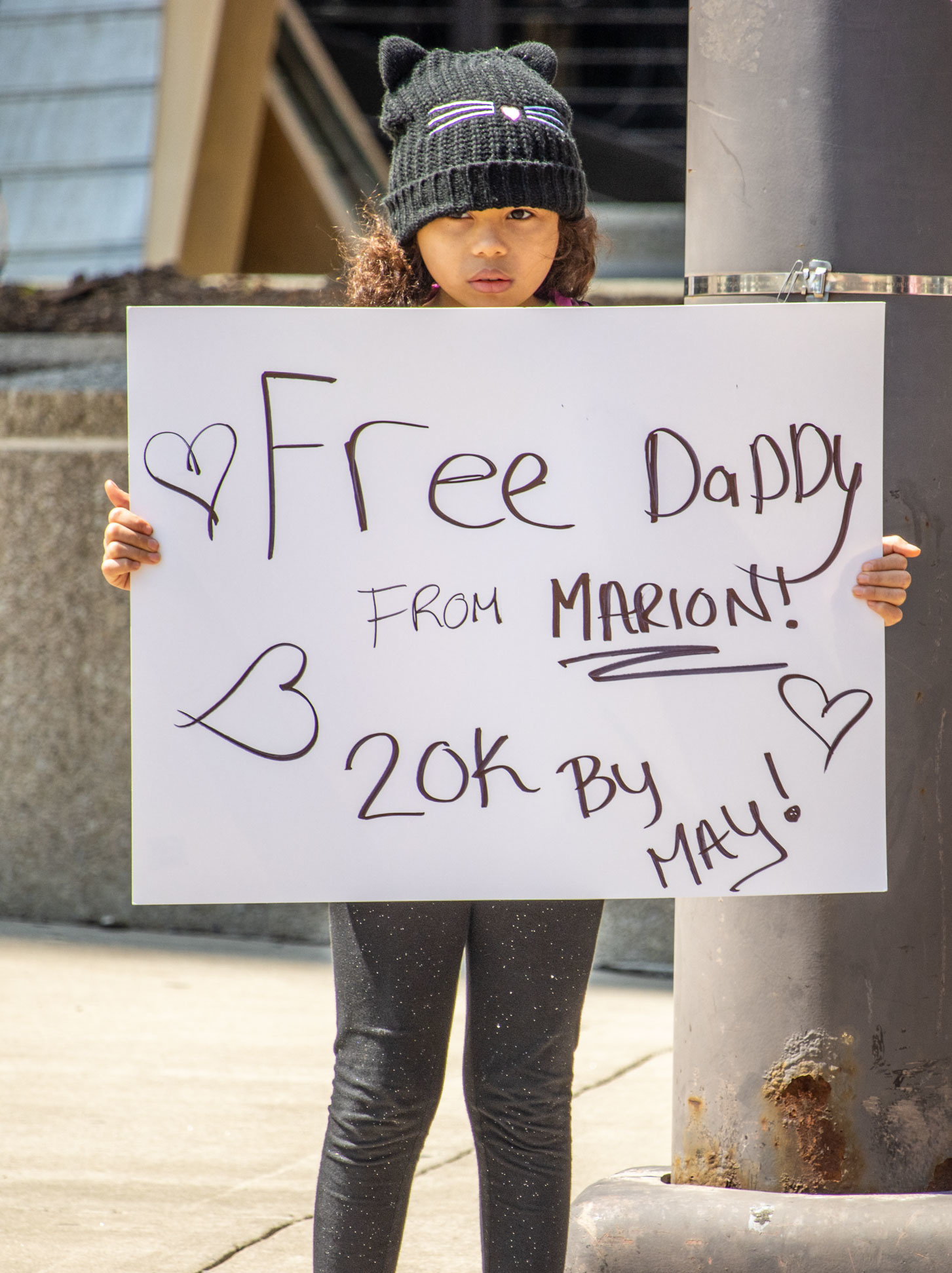 4IMG_0451